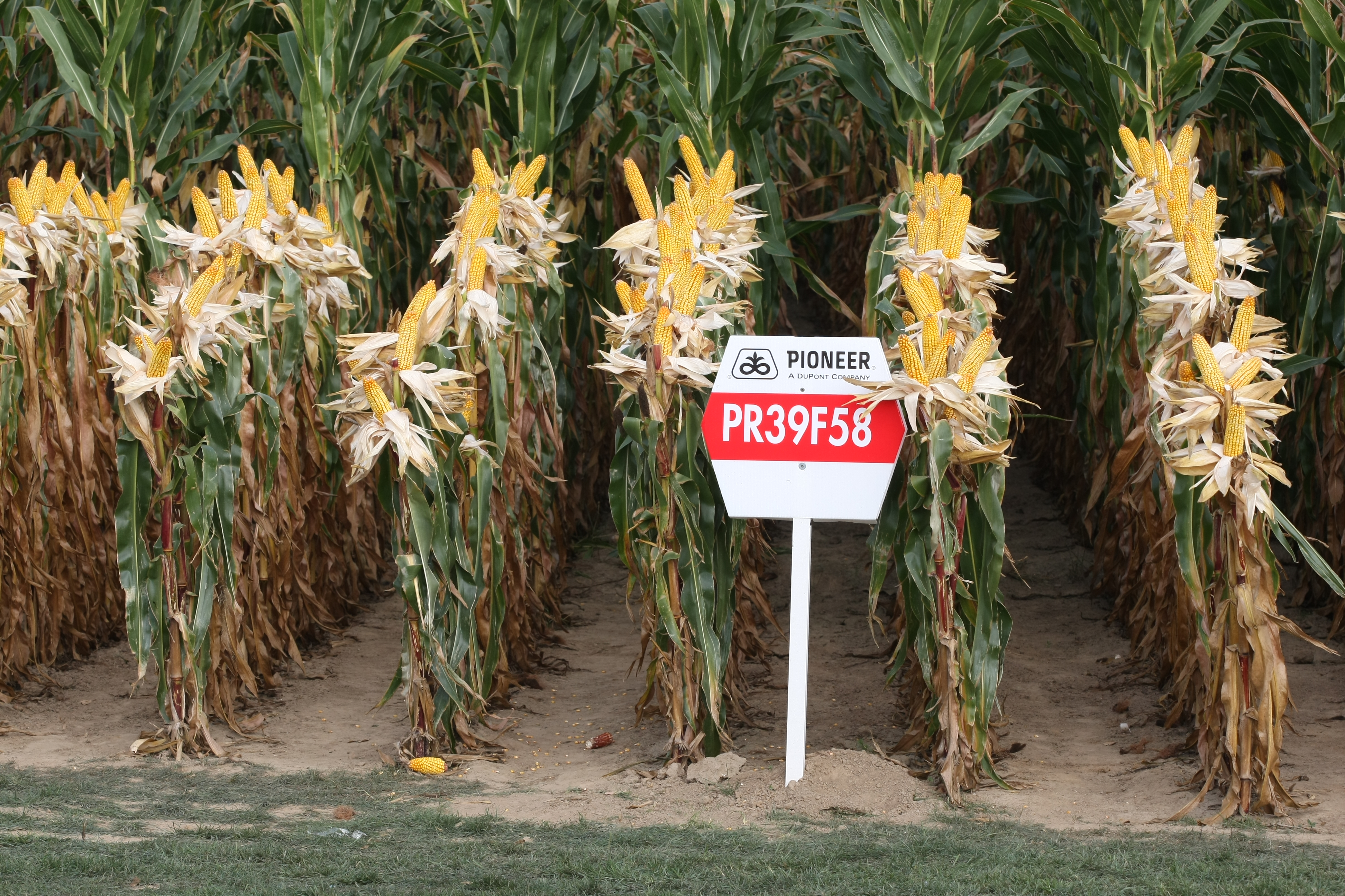 Präsentation der Pioneer-Maissorte PR39F58, Werktuigendagen 2009, Belgien